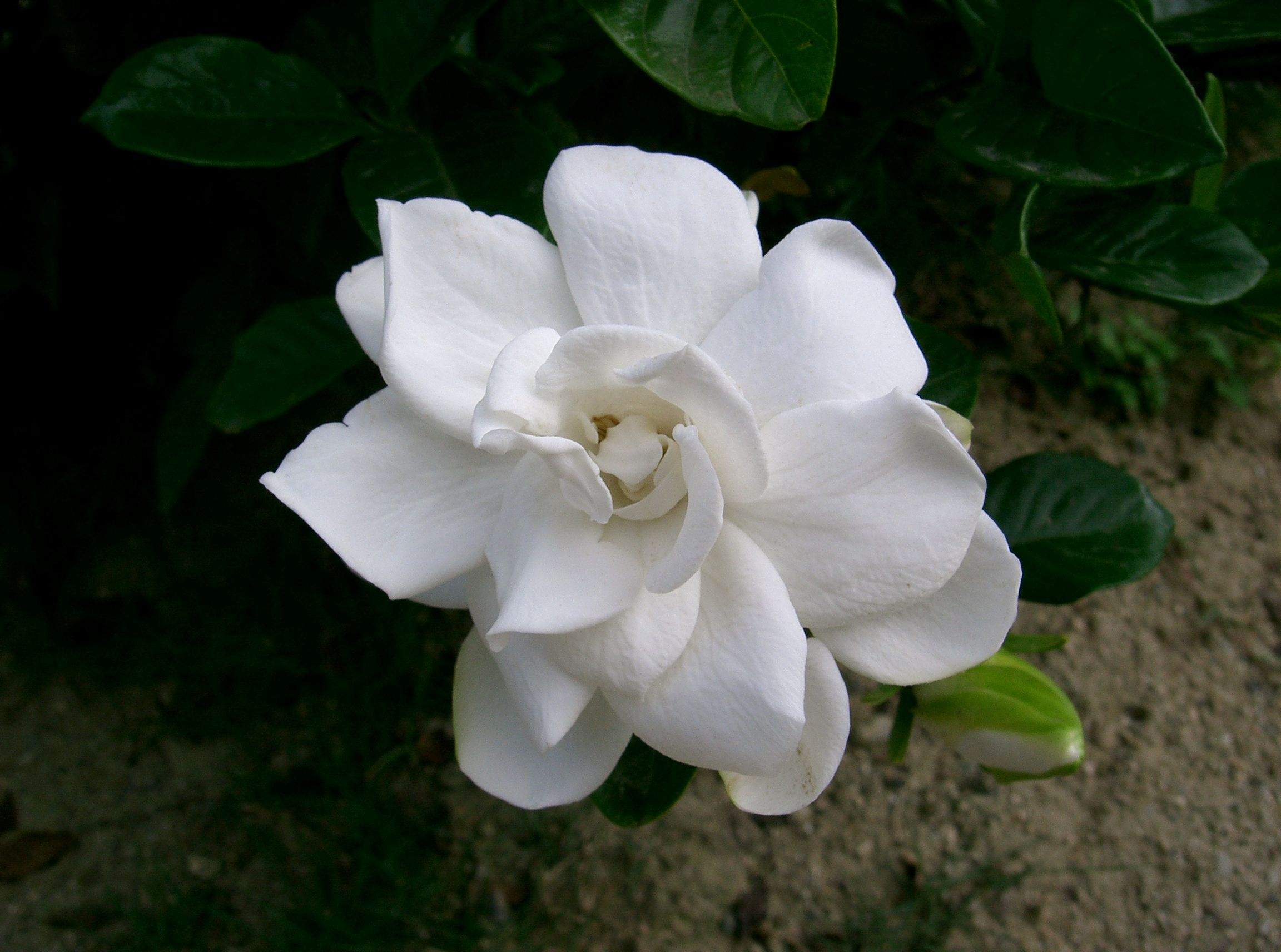 Gardenia jasminoides cv.